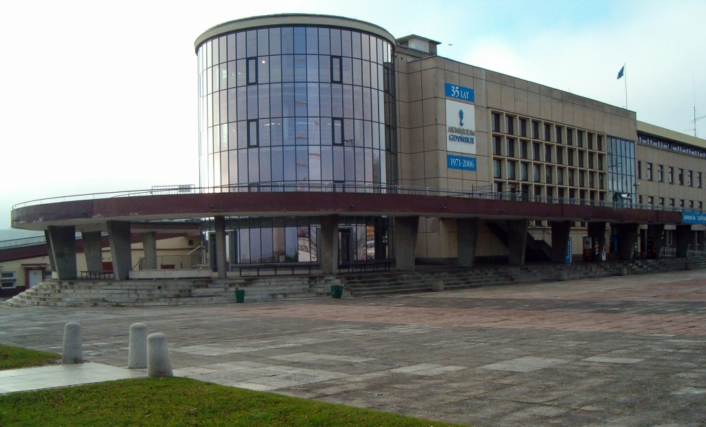 Ocenarium gdyńskie.